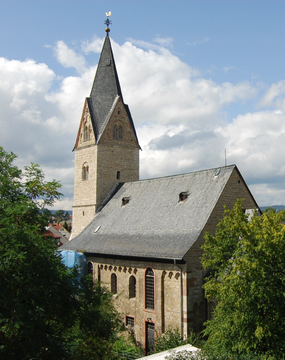 Nikolauskirche in Wiesbaden-Bierstadt